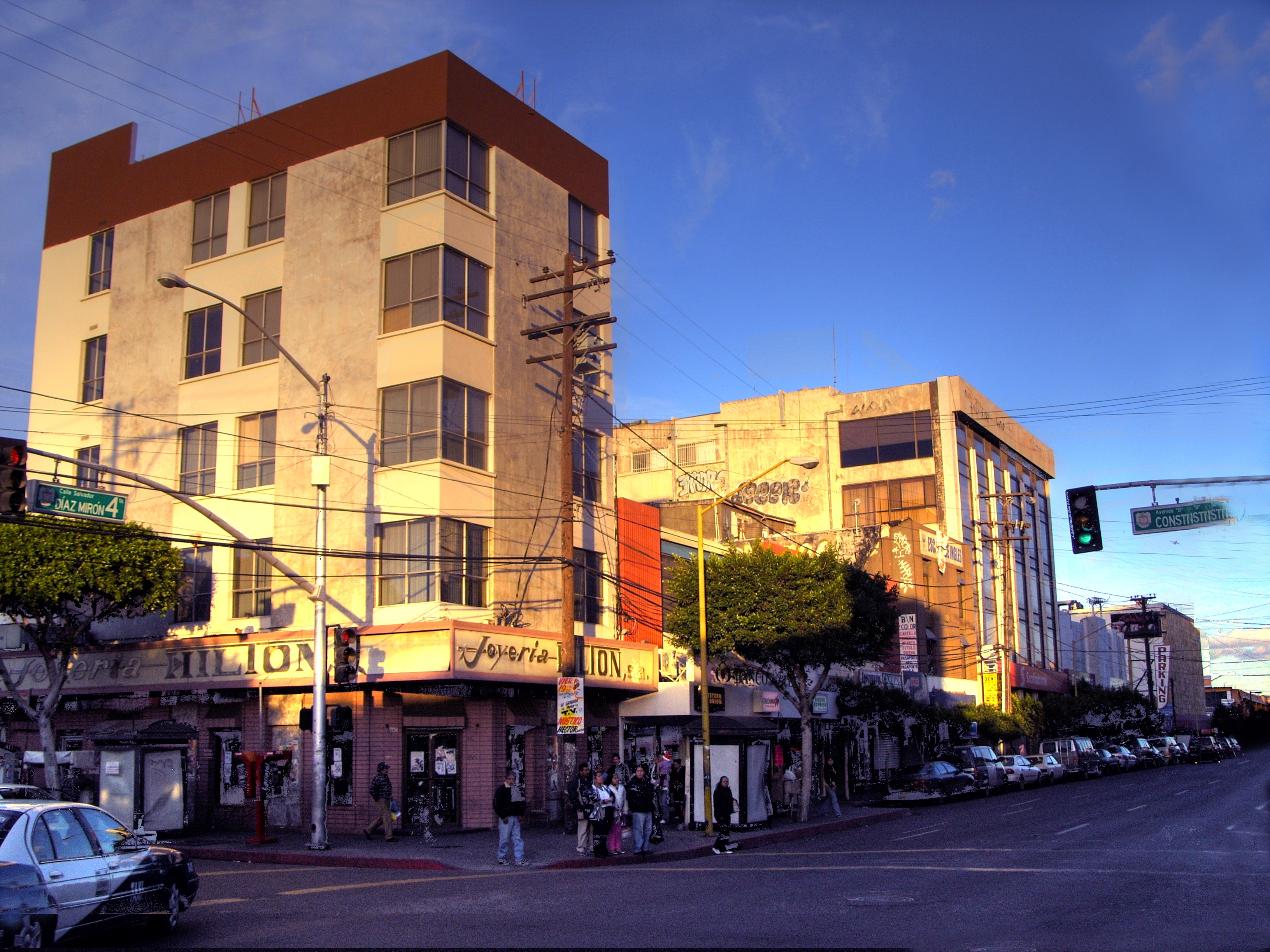 4ta y Constitucion